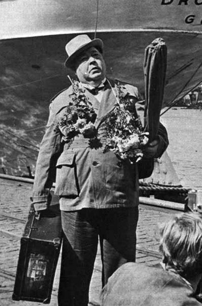 Edvard Persson vid avresan på USA-turné